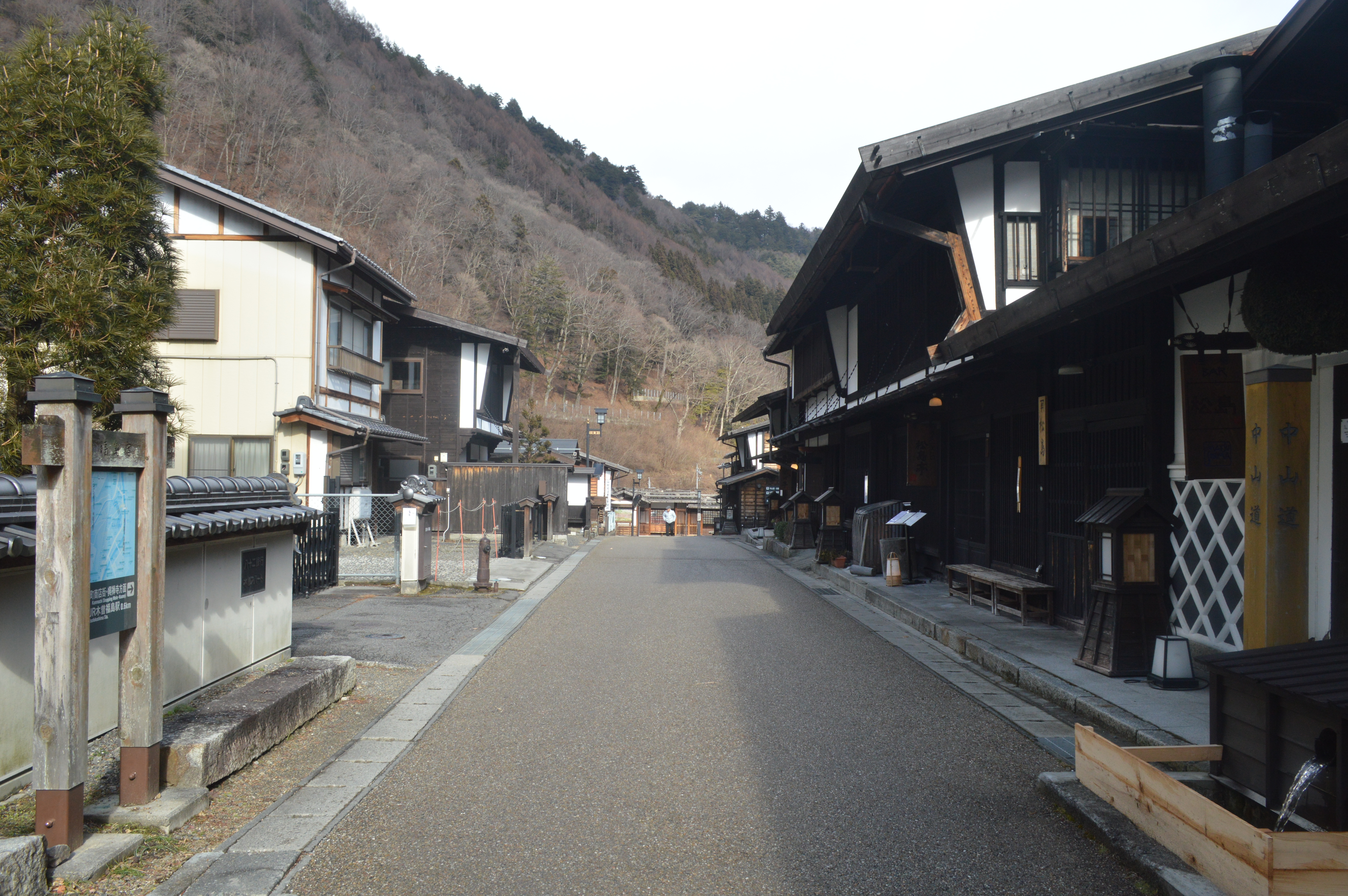 長野県木曽郡木曽町にある上ノ段地区。